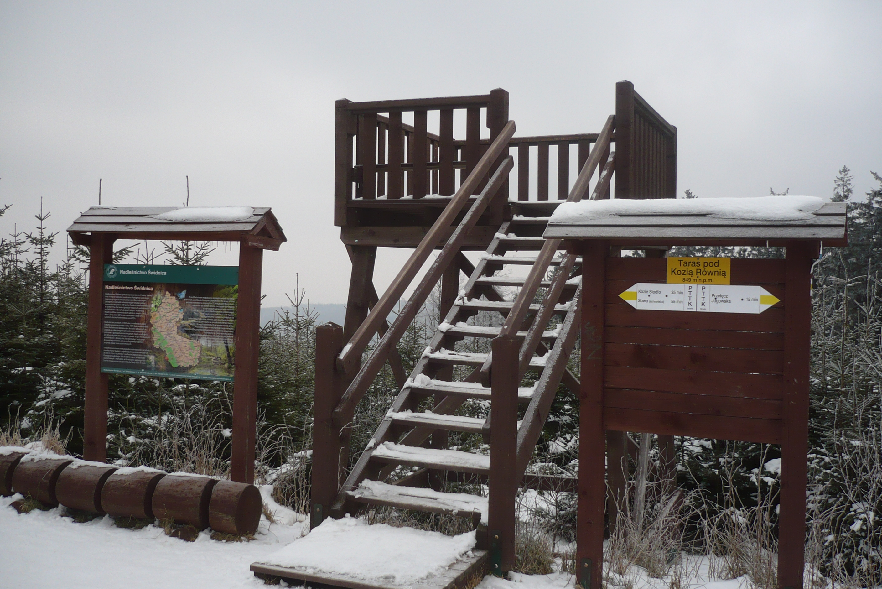 Taras pod Kozią Równiną